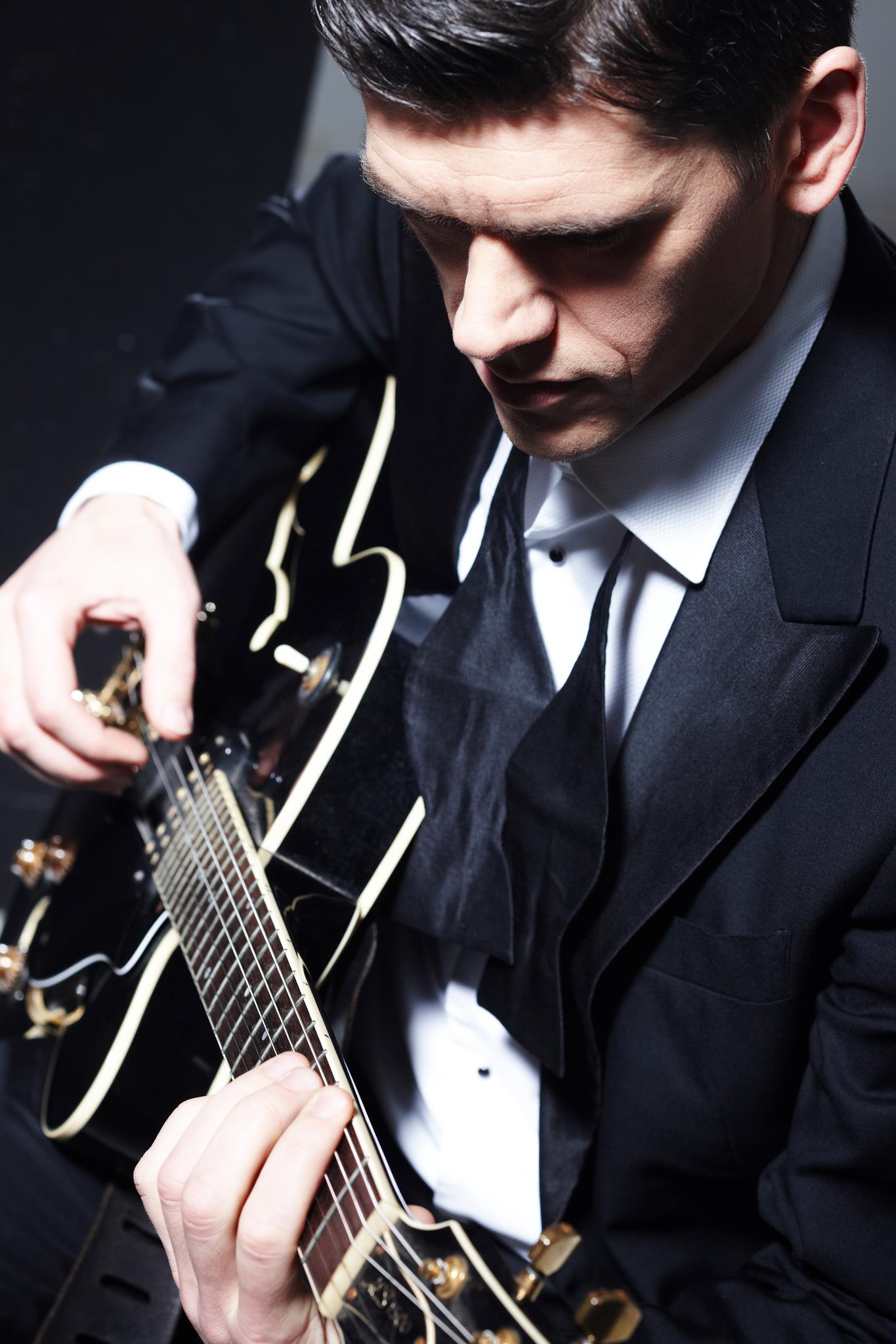 Latviešu ģitārists